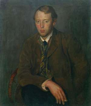 Self-portrait Aksel Waldemar Johannessen